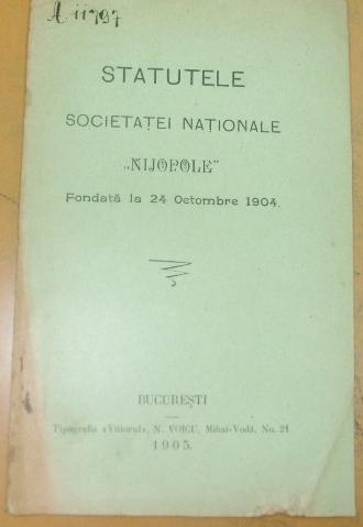 Статути на Националното общество "Нижополе"